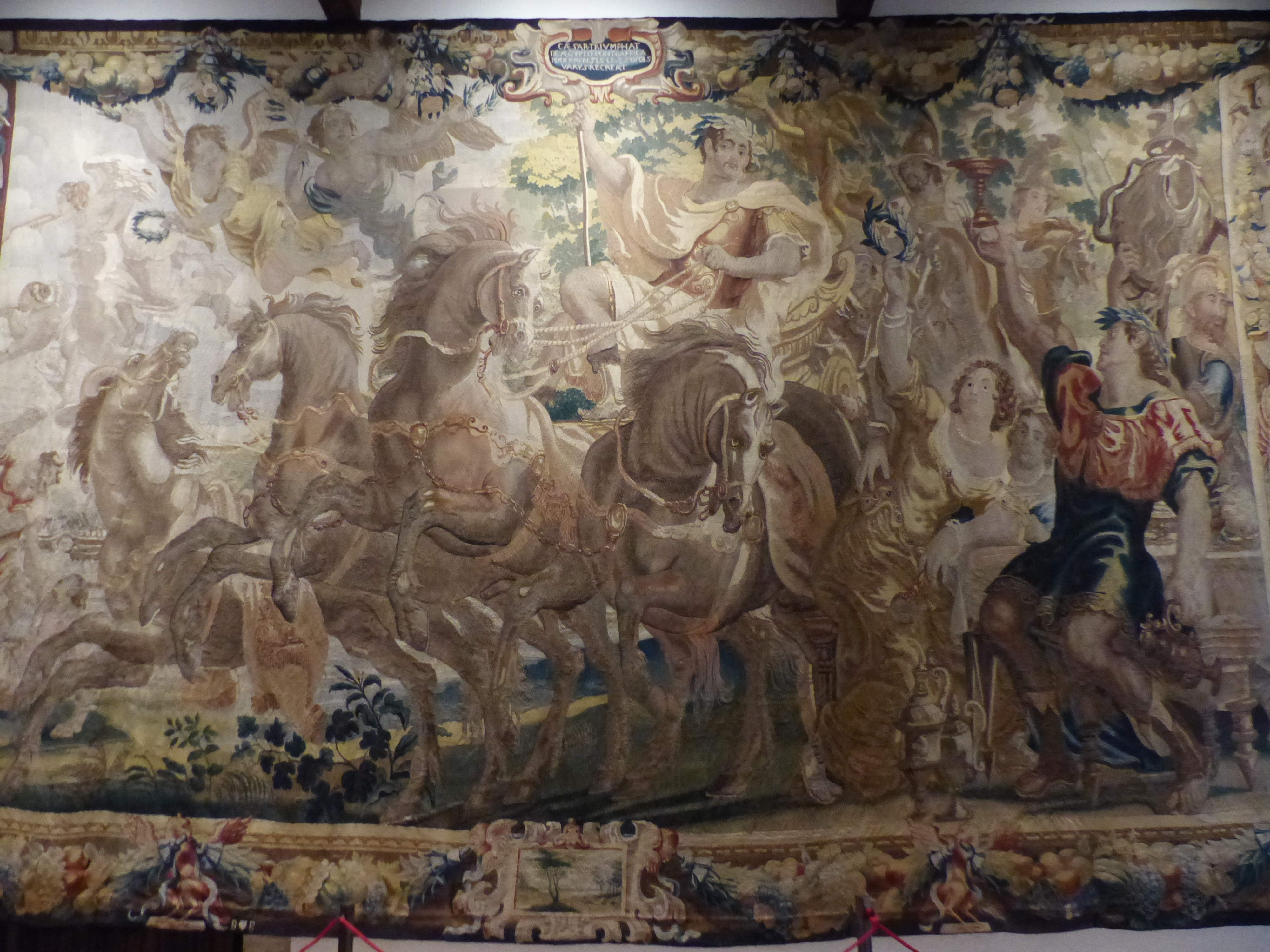 Interior del, Castillo de los Mendoza, tapiz